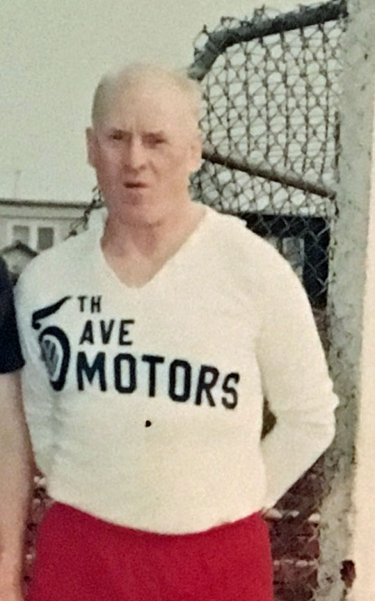 Johann Herberger (1960er Jahre)